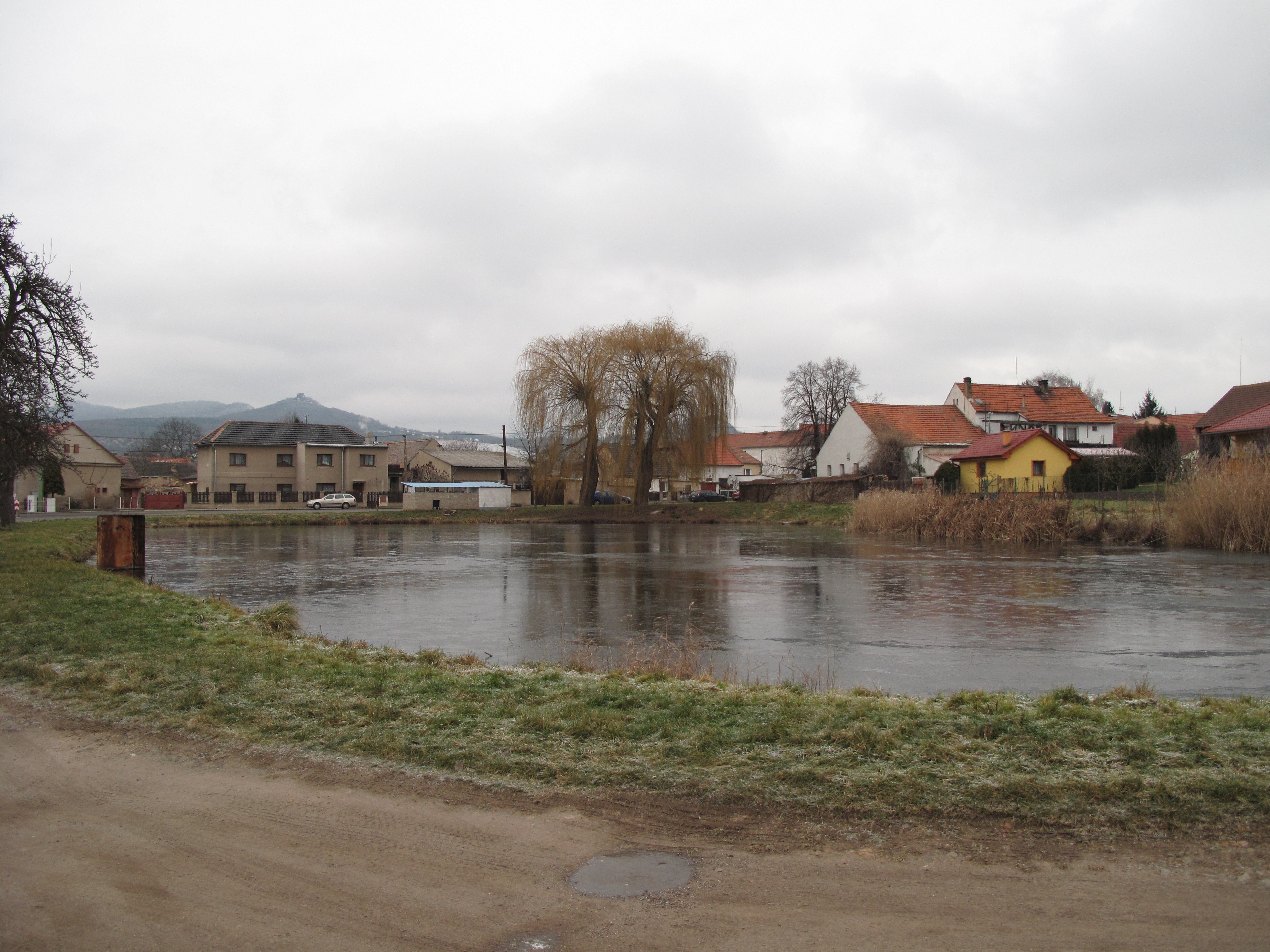 Rybník v Podsedicích. Okres Litoměřice, Česká republika.